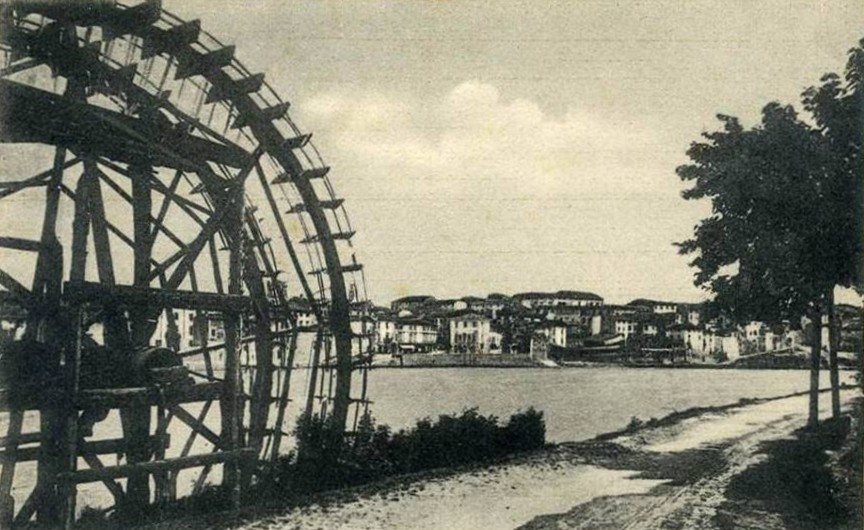 Pescantina (provincia di Verona) in una foto d'epoca. Si nota la grade pala di un mulino sul fiume Adige